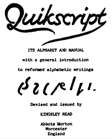 Dit is een stukje van de titelpagina van de handleiding van de steno-vorm Quickscript. Het komt uit de download uit de yahoo group die in het publiek domein is geplaatst.